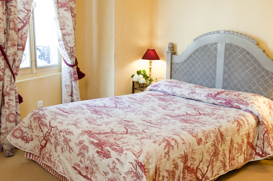 L'hôtel Palais Cardinal***, à Saint-Emilion.